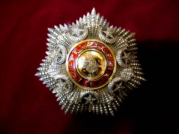 Mecidi erste Klasse Bruststern